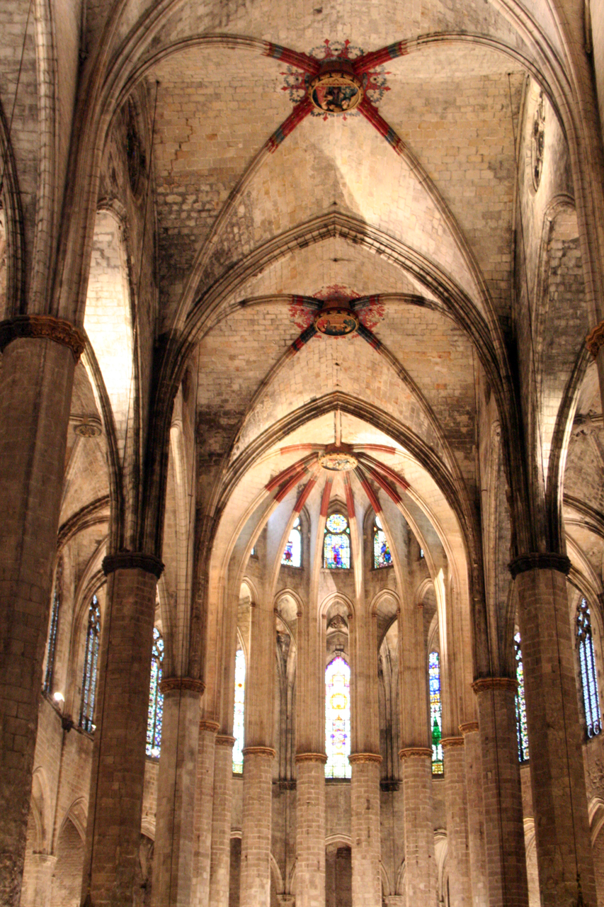 Església de Santa Maria del Mar (Barcelona), 14 d'Abril de 2007.